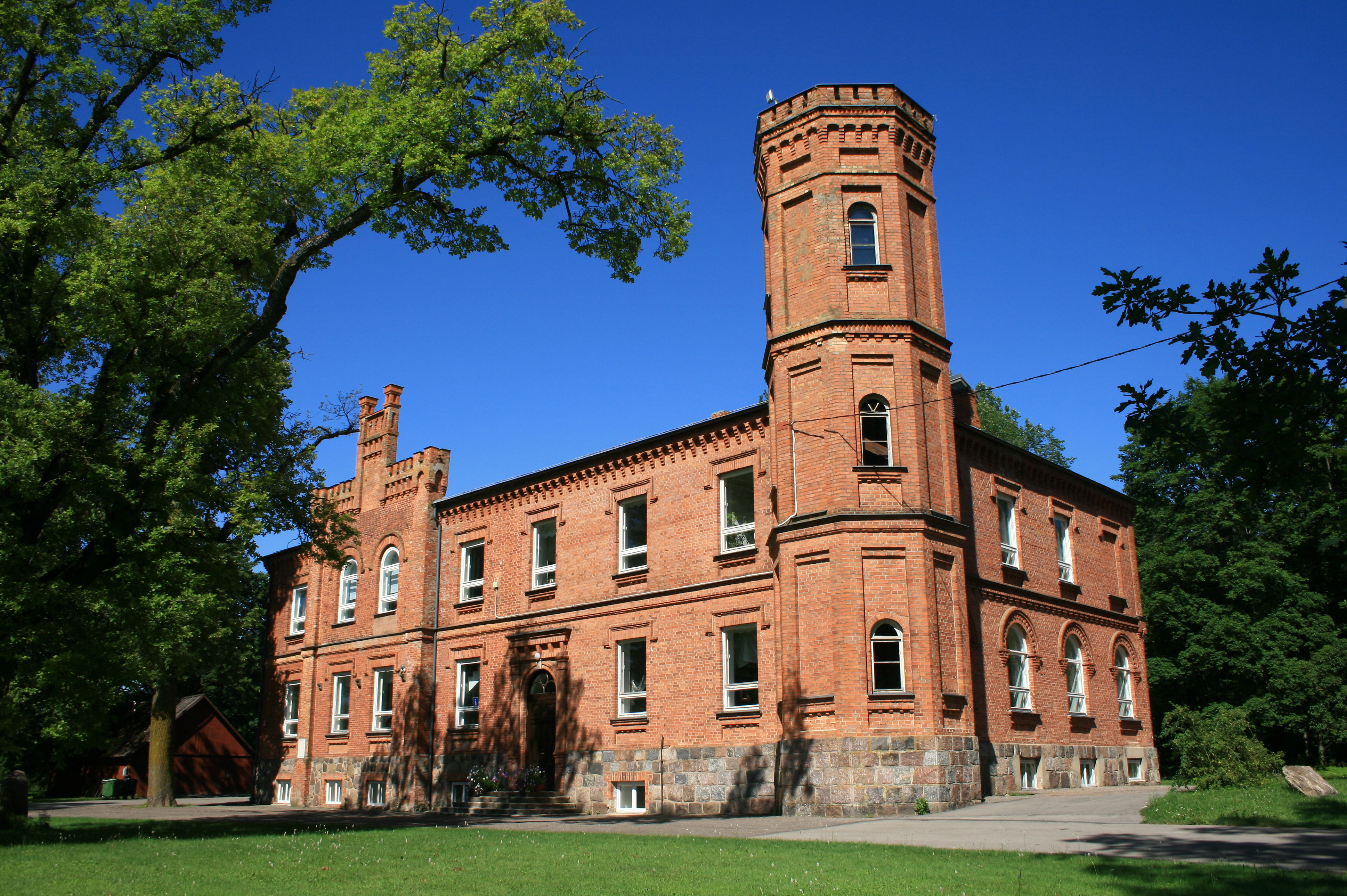 Hummuli mõisa peahoone